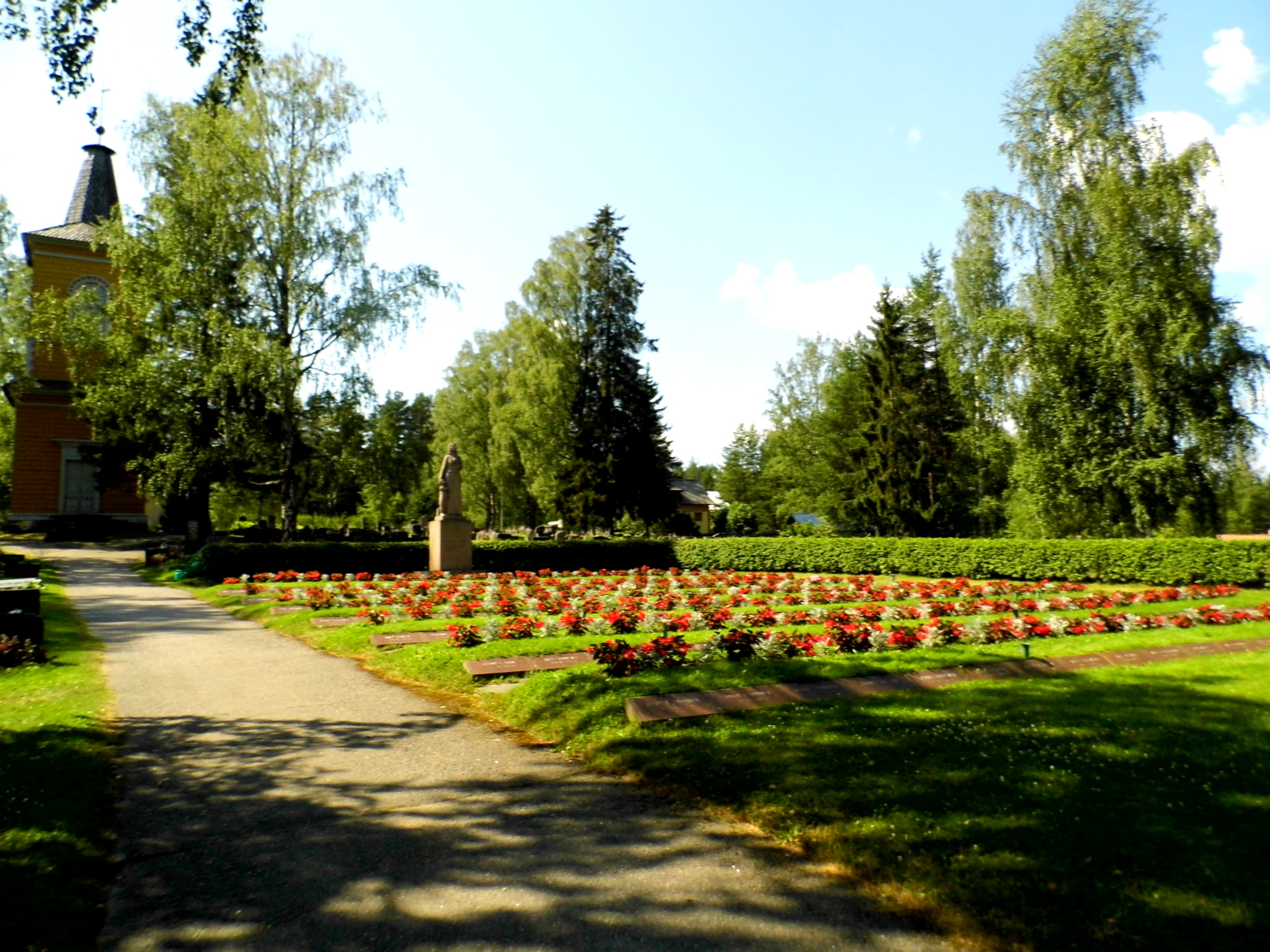 Heinolan pitäjän kirkon sankarihaudat kesällä 2014